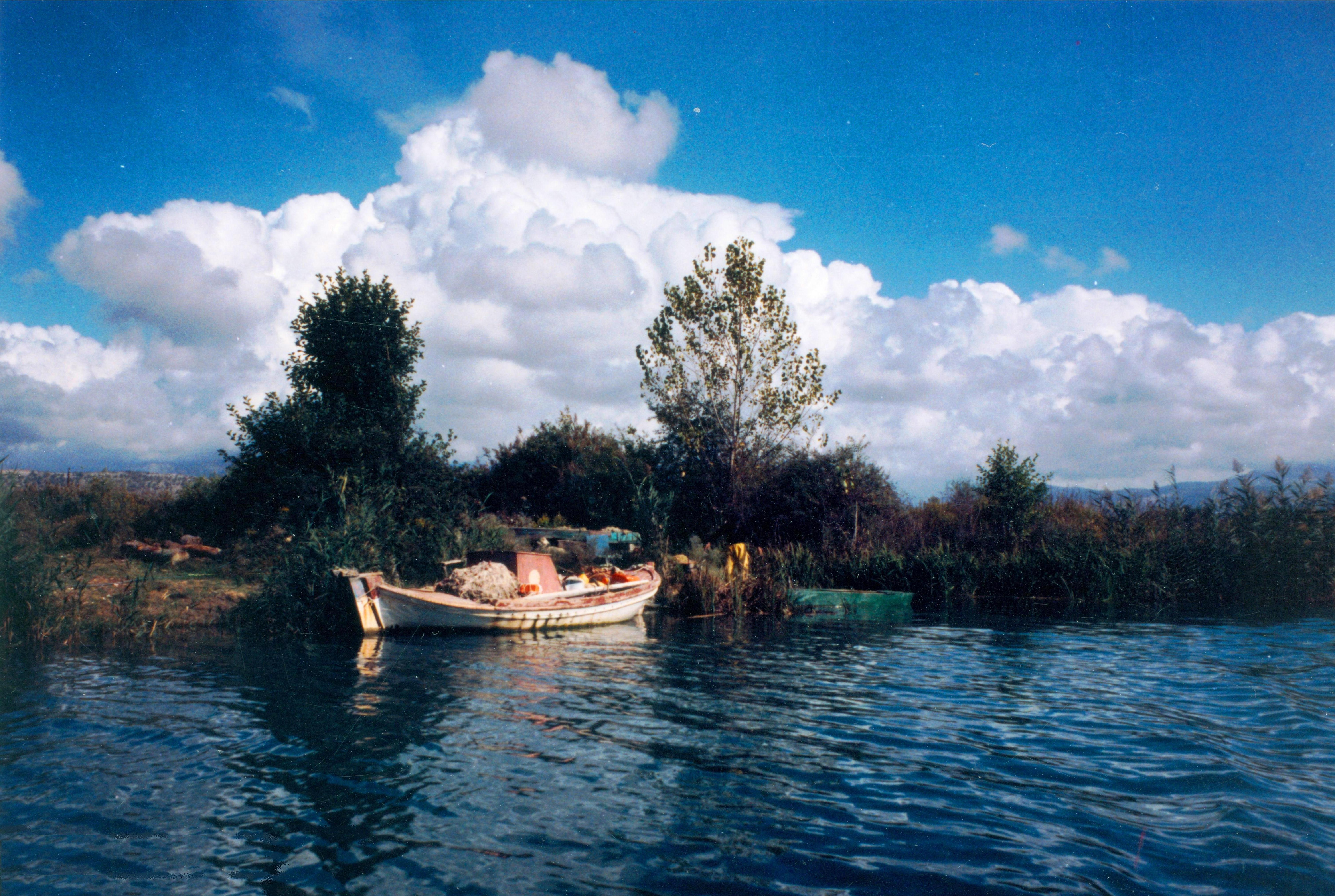 Ο Αχέρων ποταμός στο τμήμα Νο 6